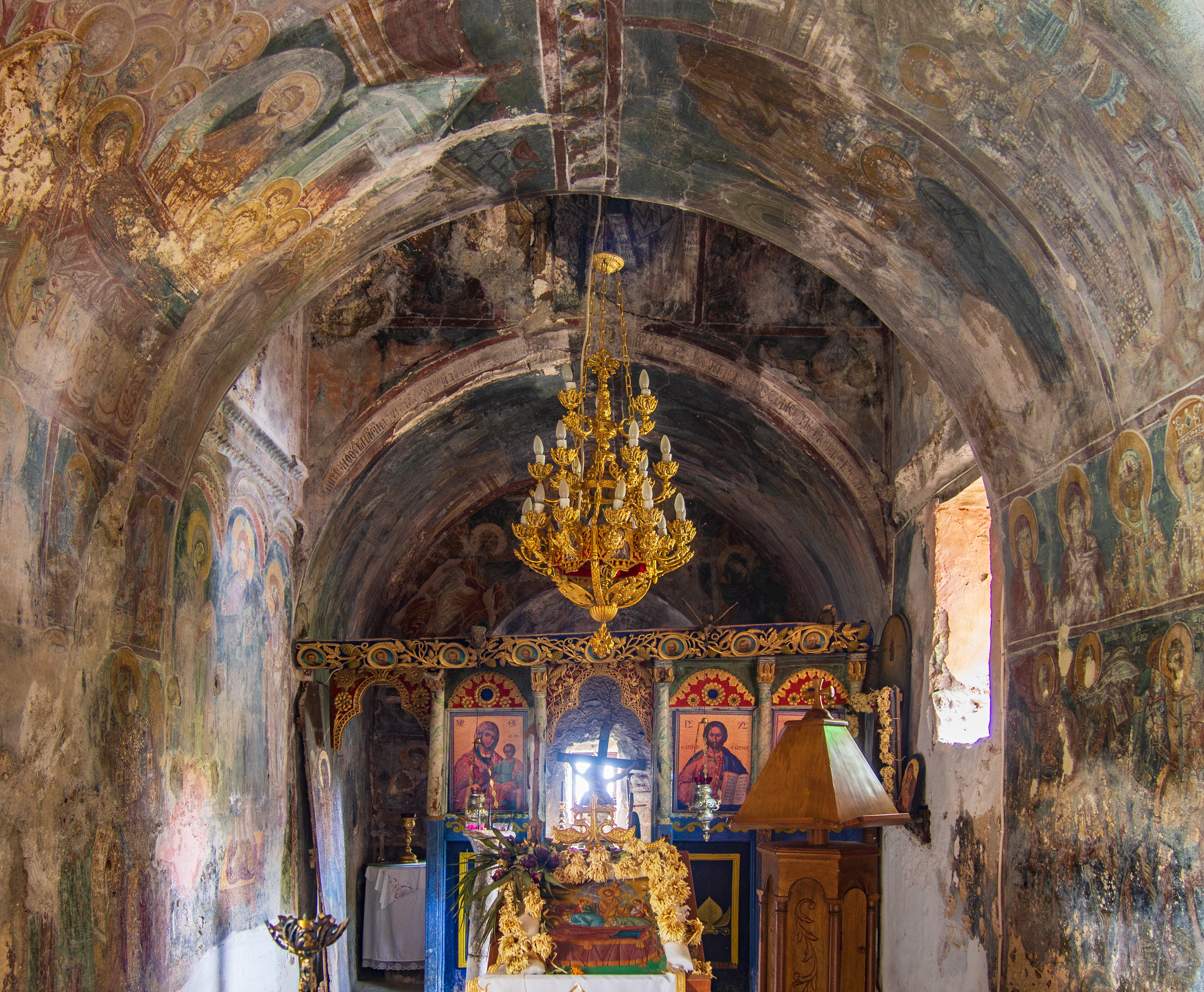 Ναός Παναγιάς Οδηγήτριας, Σπηλιές«Ναός Παναγιάς Οδηγήτριας (Σπηλιές)»